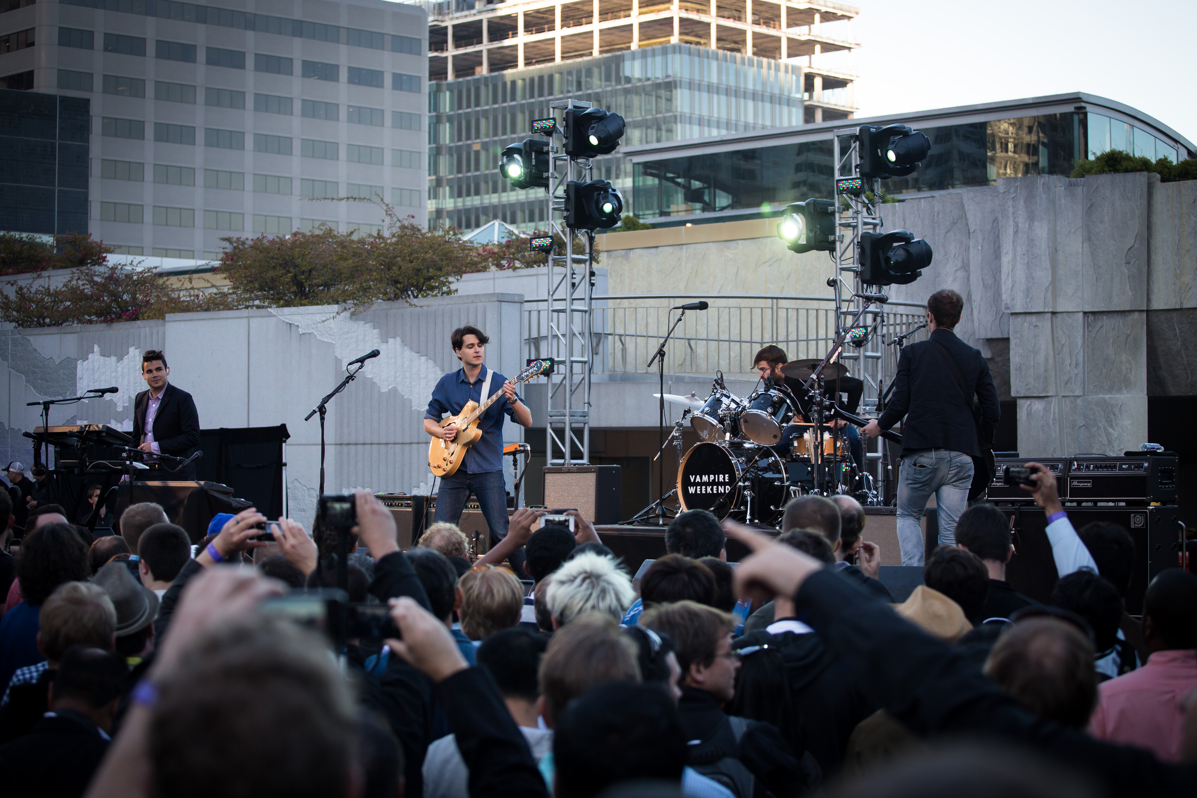 Vampire Weekend in Financial District South, San Francisco, VS